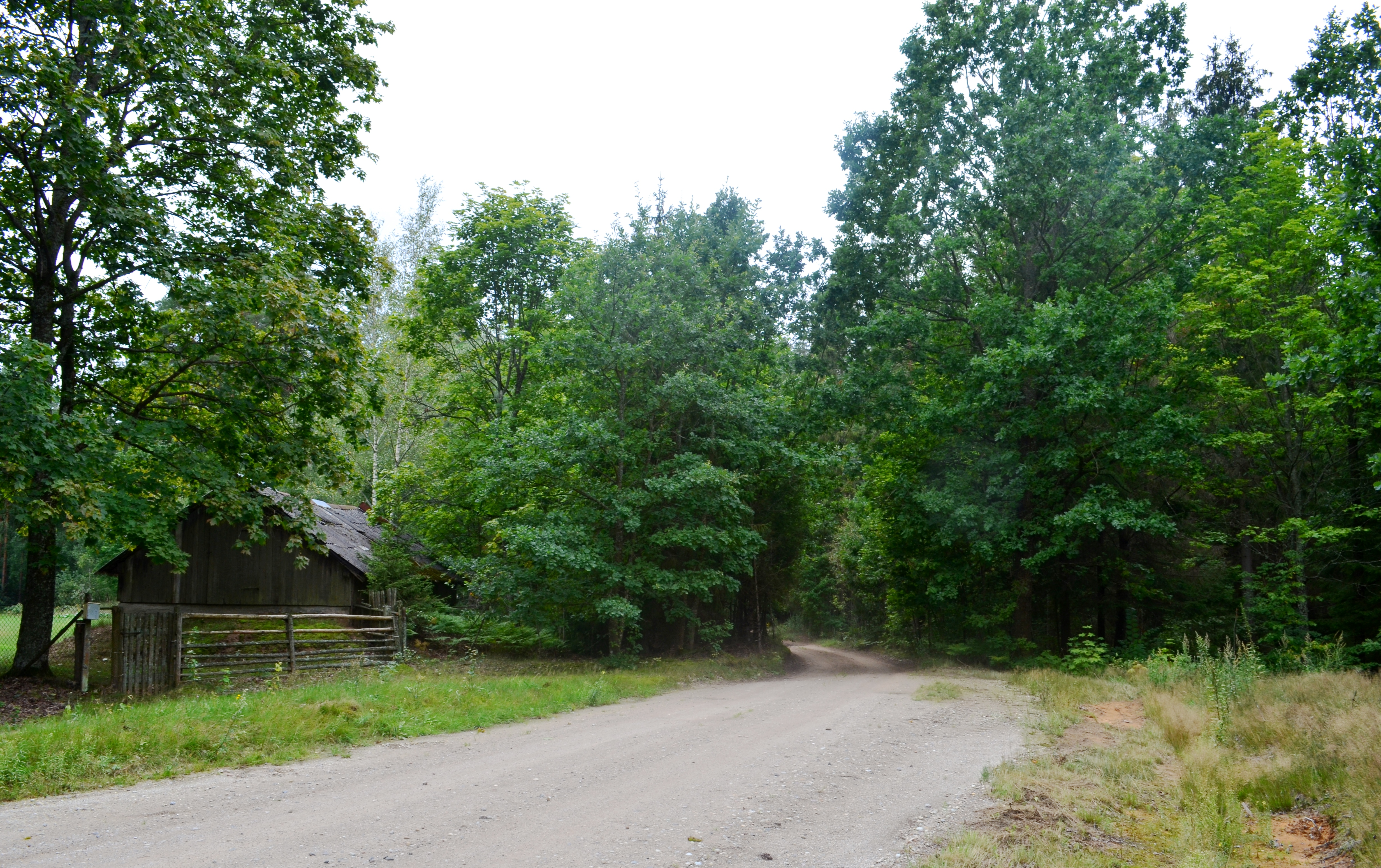 Zūkai, Kazlų Rūdos sav.